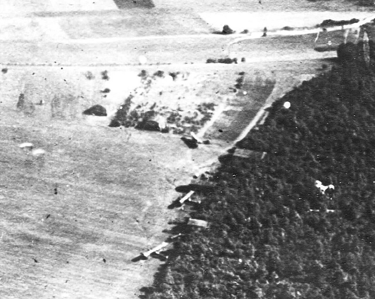 Autreville Aerodrome - photograph